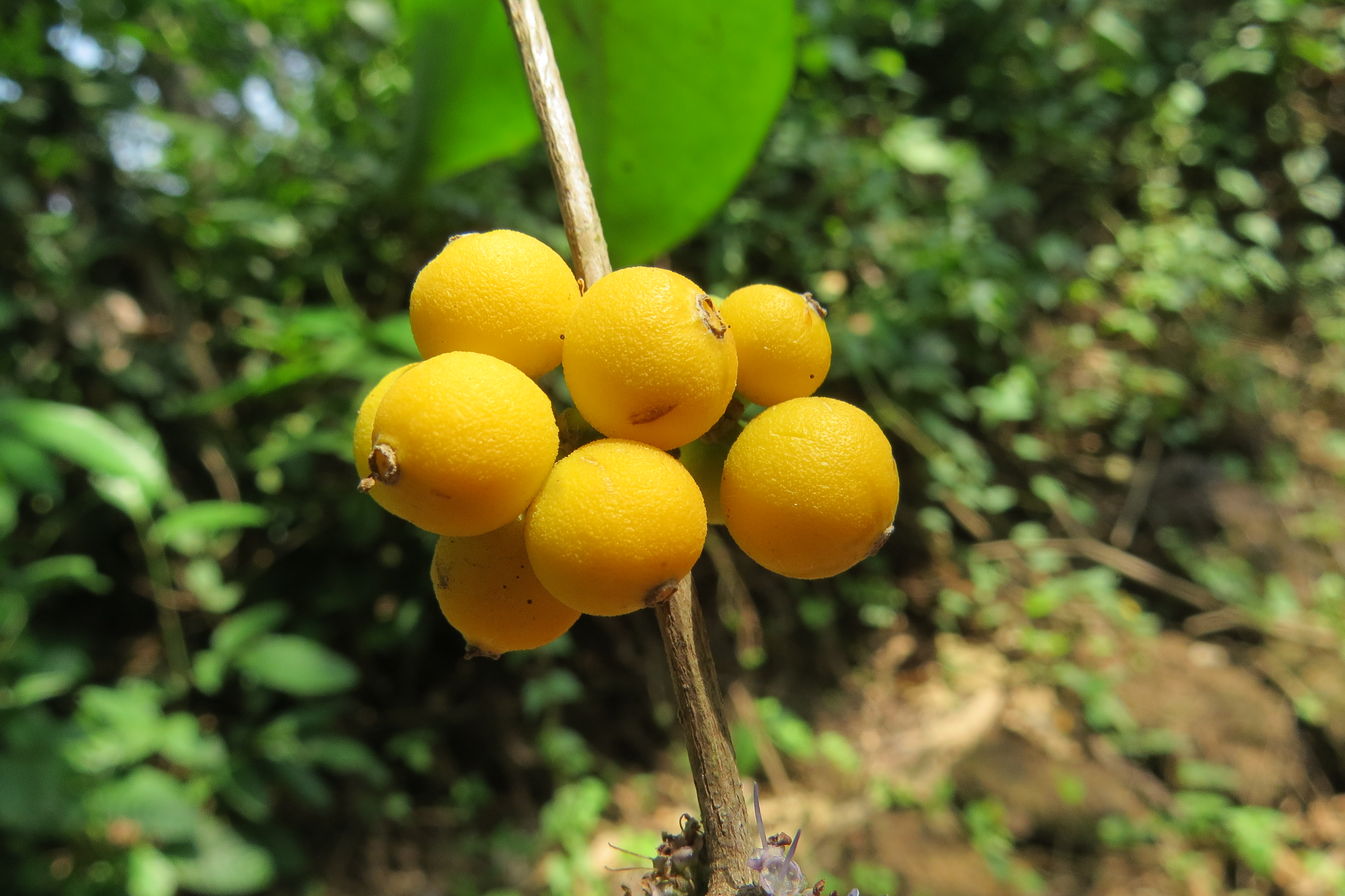 Photos by Vinayaraj